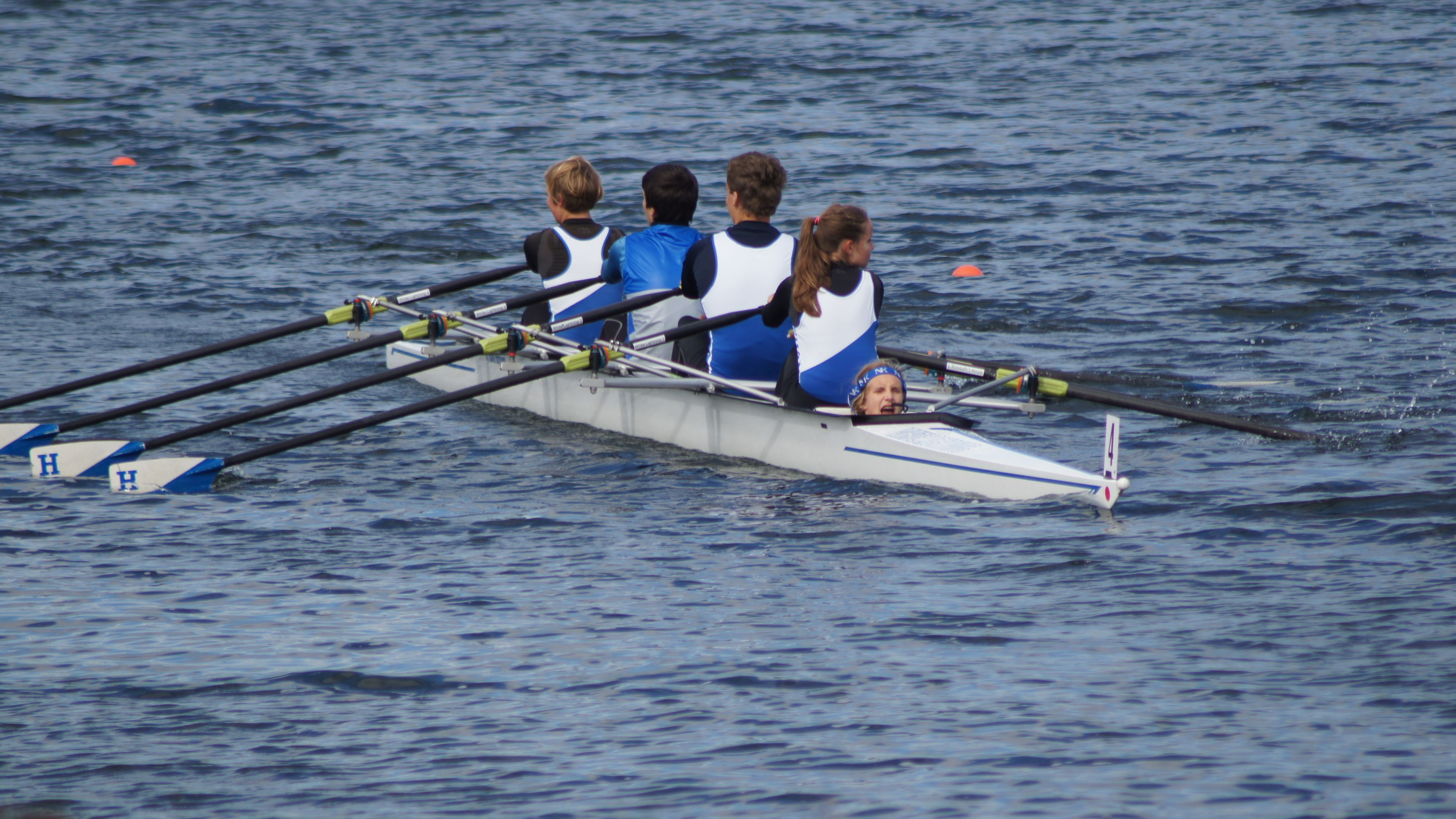 Gemischter Nachwuchsvierer RC Hansa Dortmund 2014